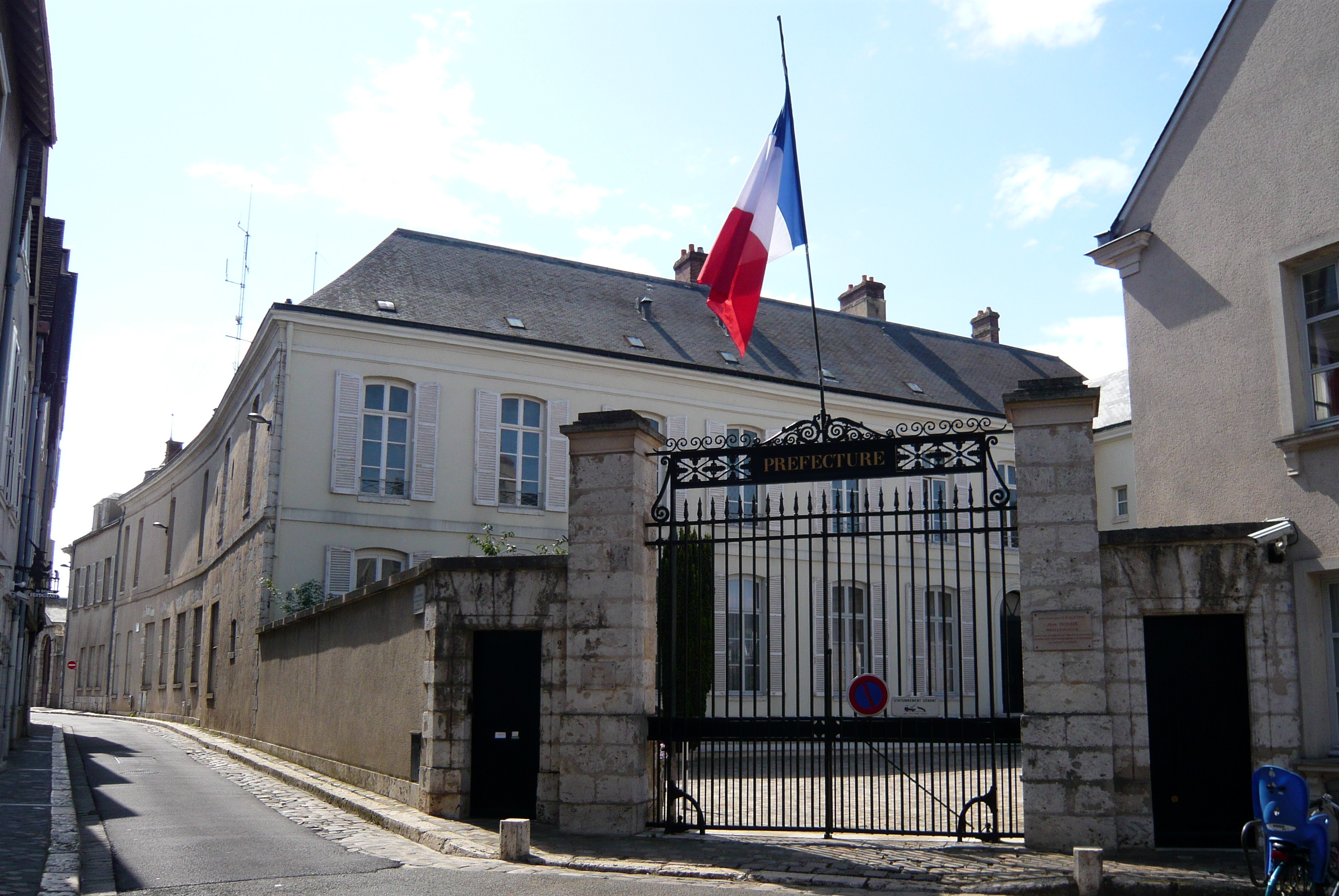 Préfecture d'Eure-et-Loir, hôtel de Ligneris (1795), Chartres (France).